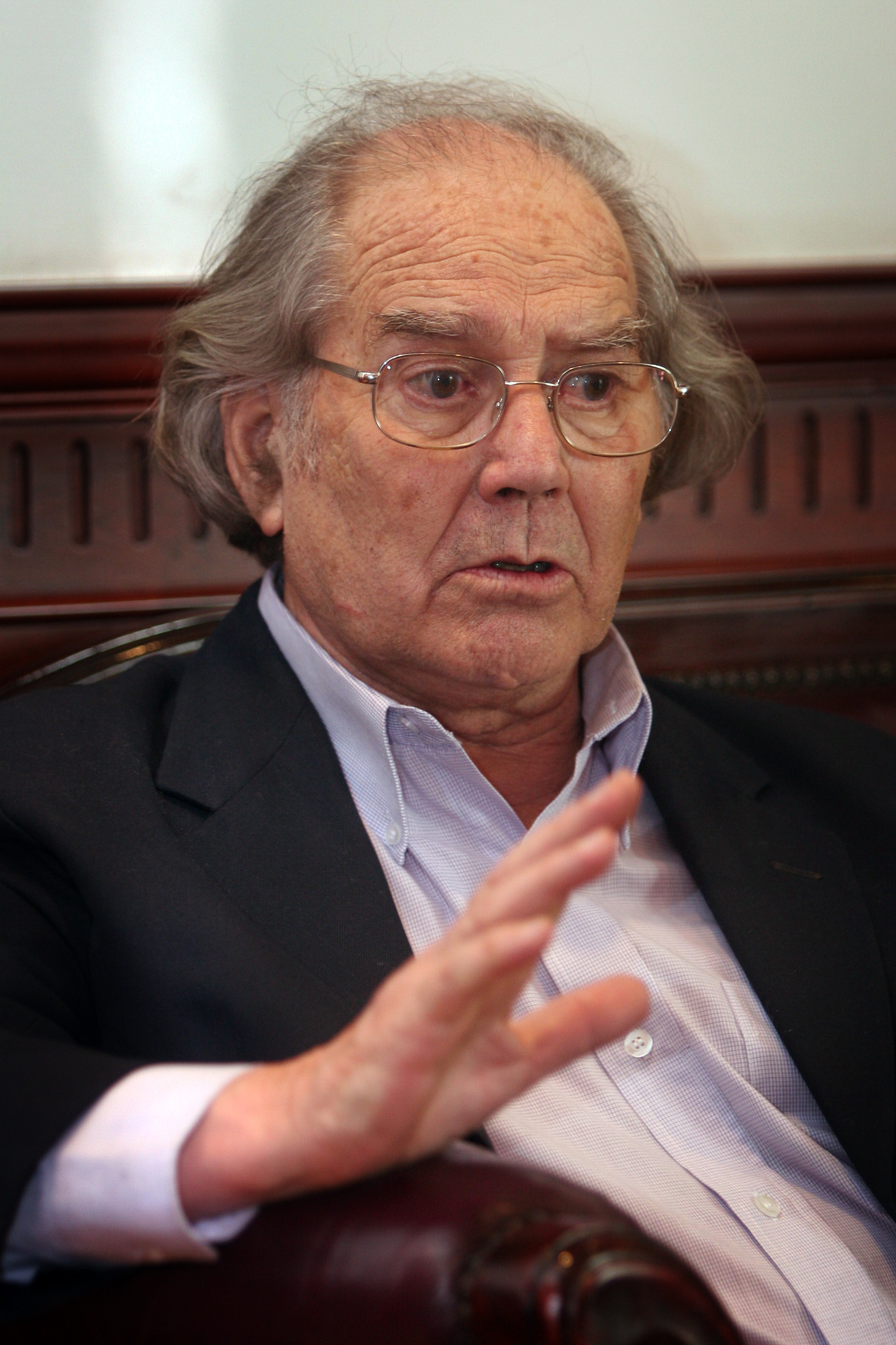 Foto: Romina Icaza/ Asamblea Nacional.